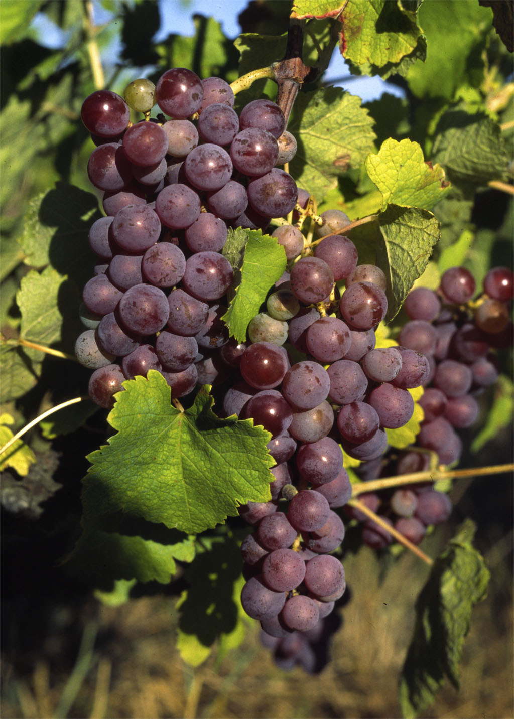 Traube der Rebsorte Mauzac, selbst erstellt von BerndtF, GNU-FDL